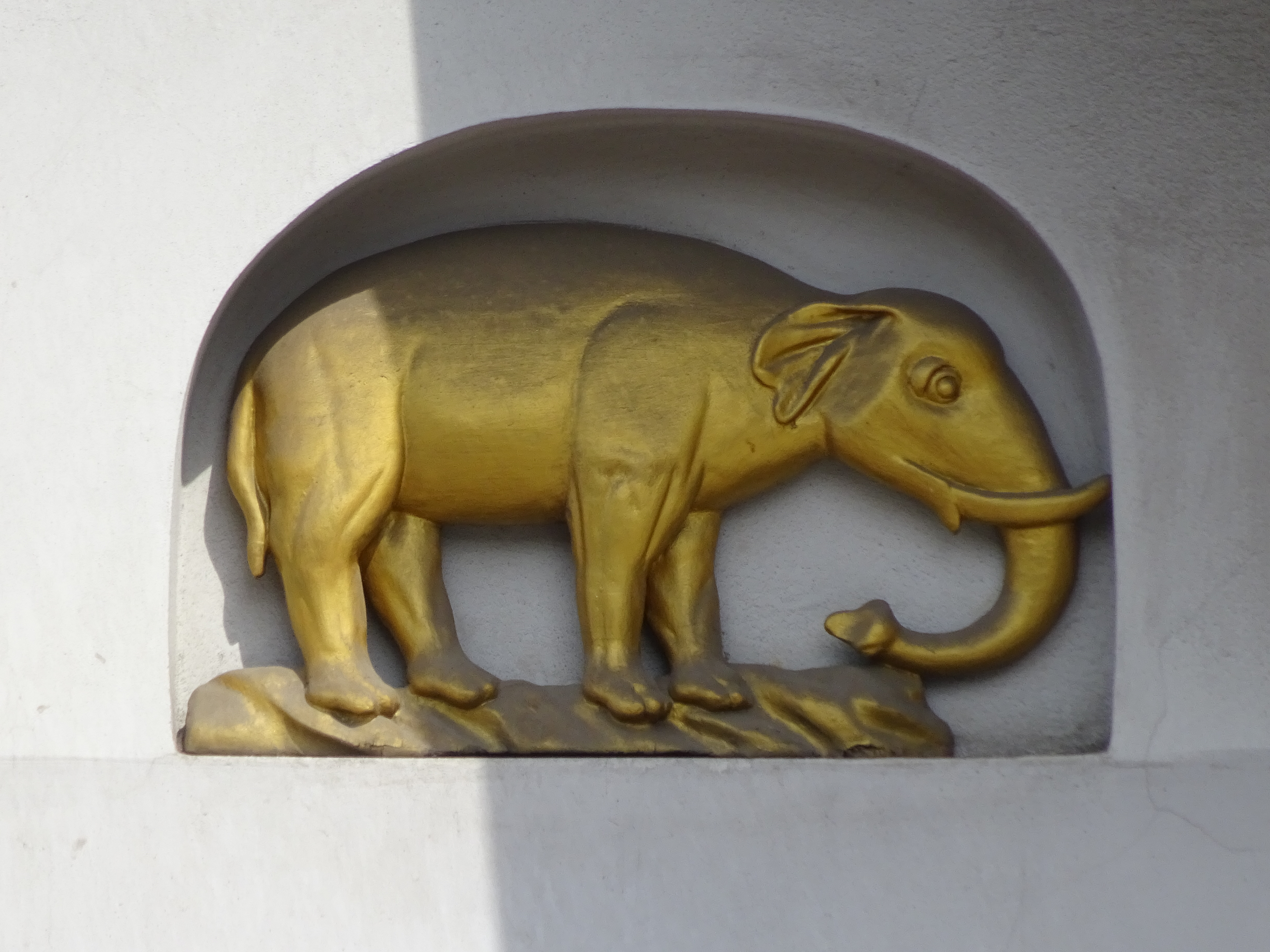 Godło Kamienicy Pod Złotym Słoniem w Krakowie na ulicy Grodzkiej 17 - godło znajduje się od strony Placu Wszystkich Świętych.